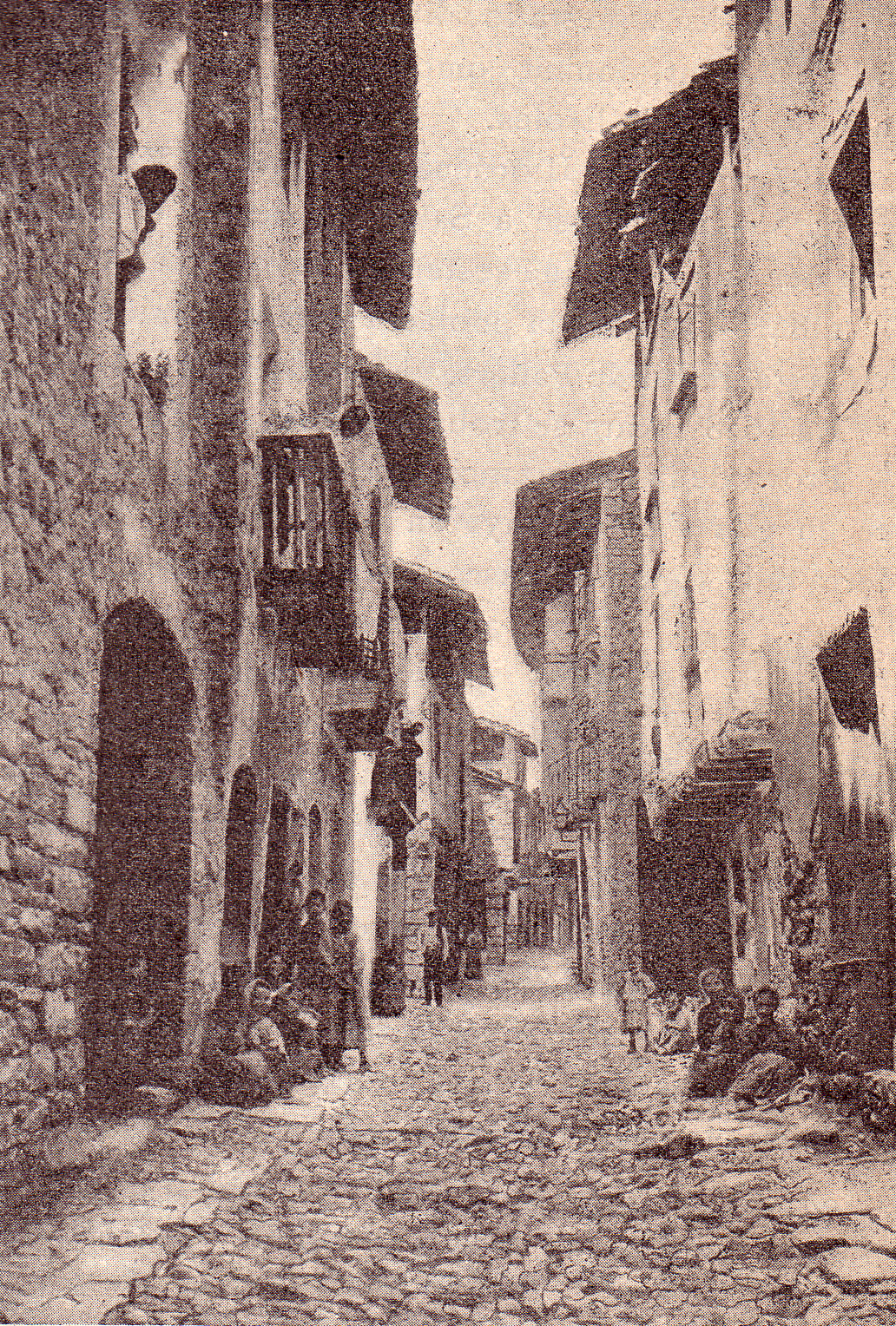 Un carrer de Salàs de Pallars el 1900 (Pallars Jussà)